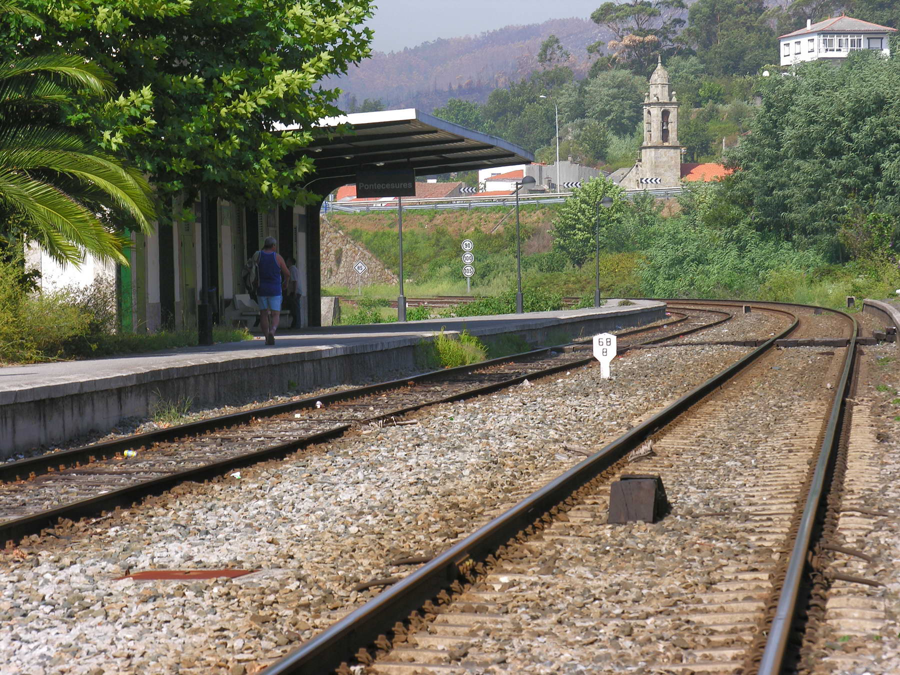 Vías do tren e parada, Pontecesures, Galicia Publish by= Luis Miguel Bugallo Sánchez. Self made.